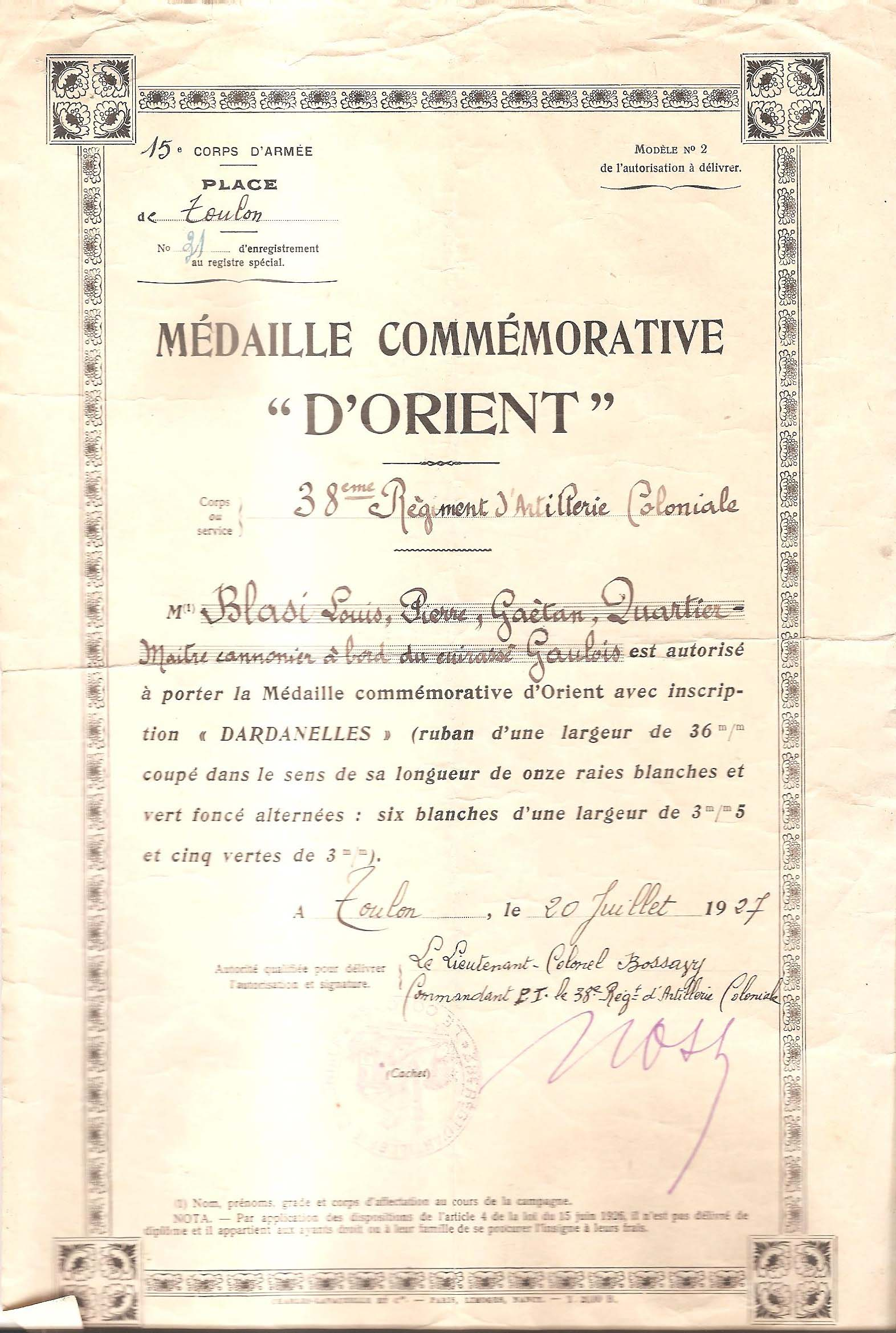 Certificat de la Médaille Commémorative “d'Orient” avec inscription “DARDANELLES” attribuée à Louis Blasi.